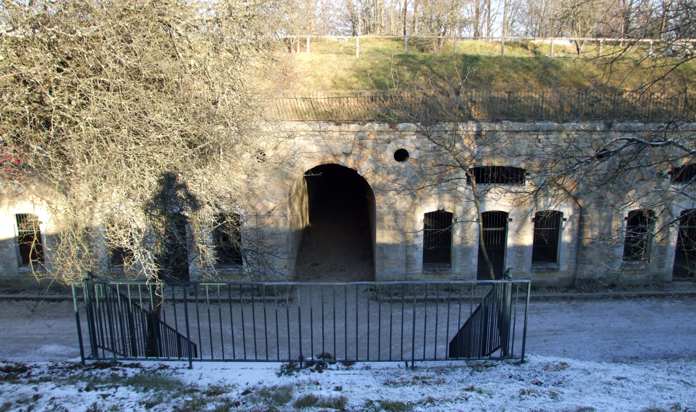 Fort de la Redoute de Saint-Apollinaire, Saint-Apollinaire, Côte-d'Or, Bourgogne, FRANCE